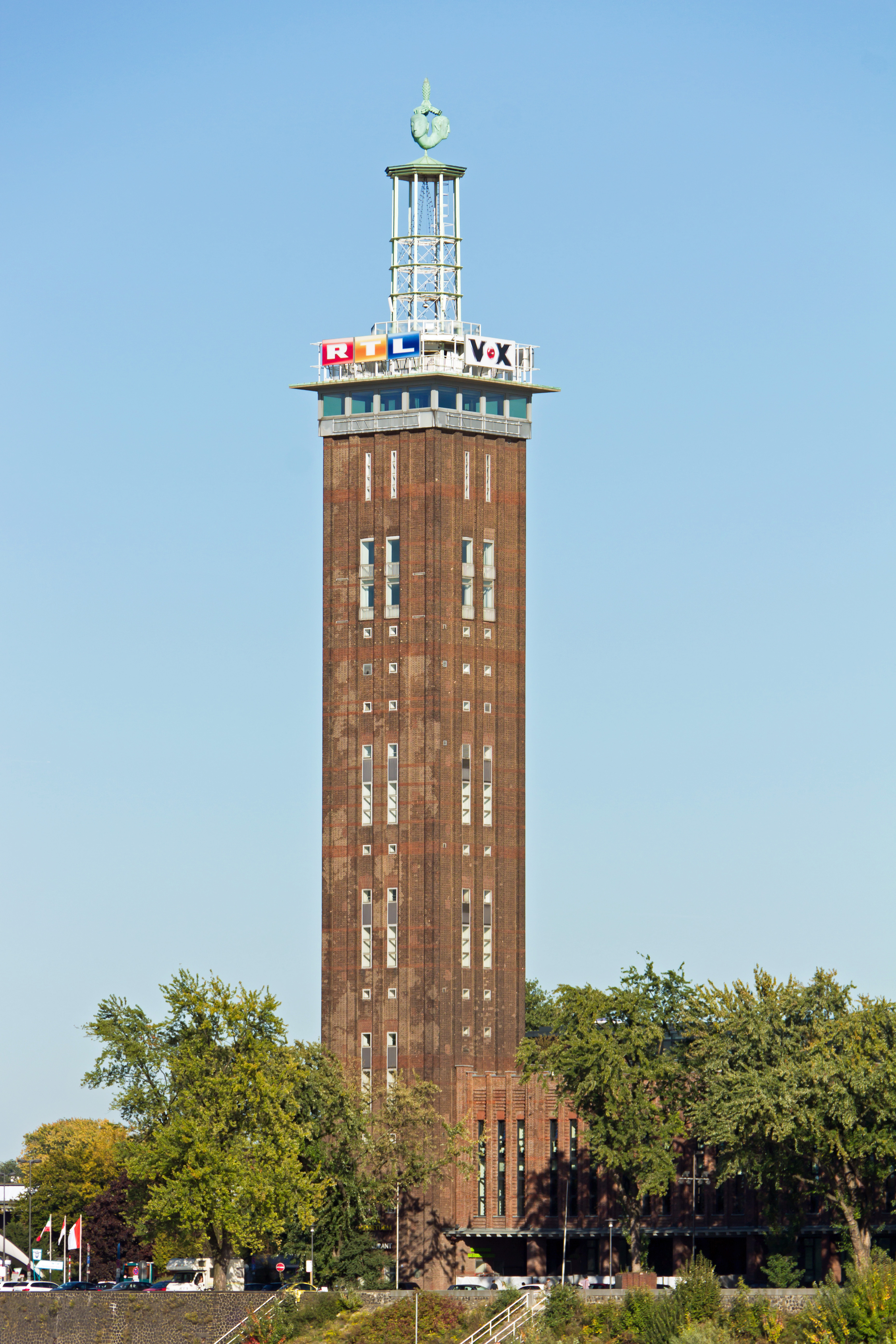 Denkmalgeschützter Messeturm, Teil der Rheinhallen. Mit Werbung für die Fernsehsender RTL und VOC der RTL-Gruppe, seit diese im nördlichen Teil der Rheinhallen ihren Sitz haben This is a photograph of an architectural monument.